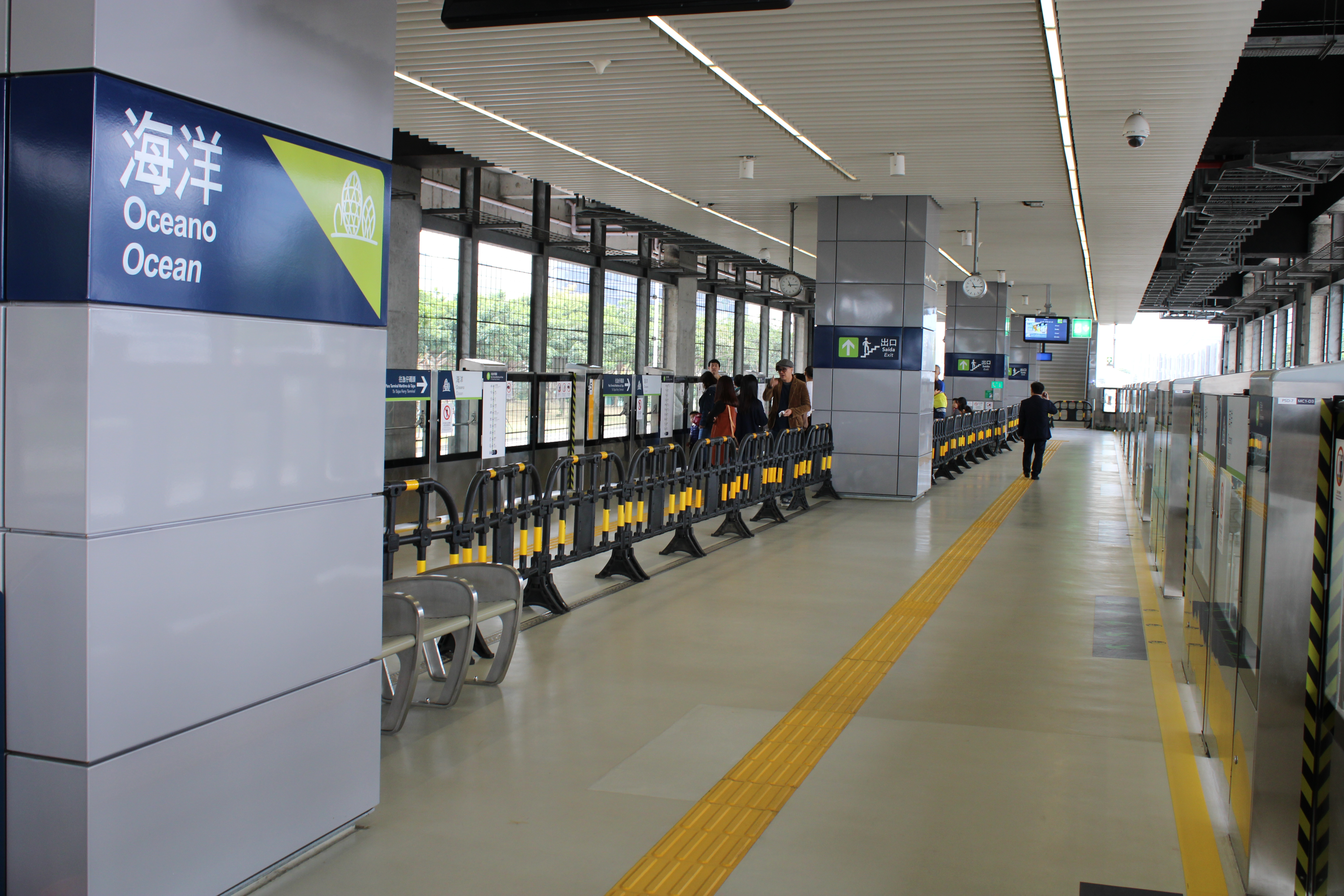 2019年12月的澳門輕軌氹仔線海洋站月臺。